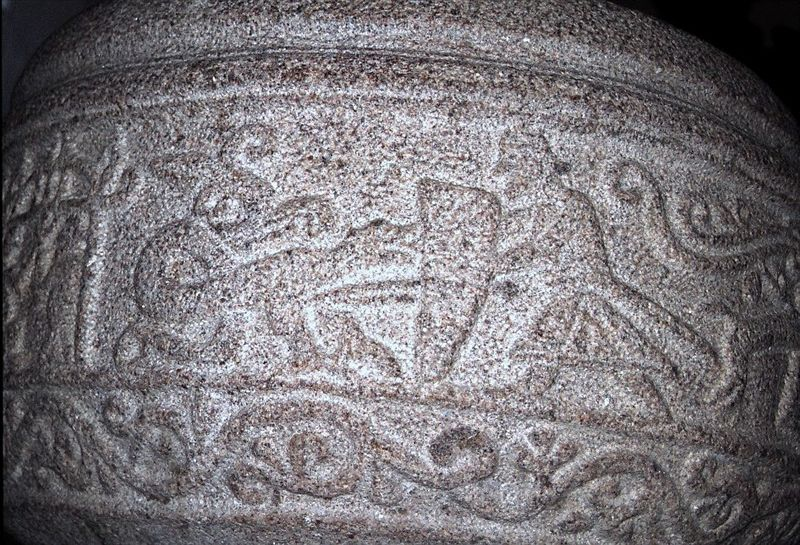 Lihme Kirke, (Skive Kommune), Døbefont